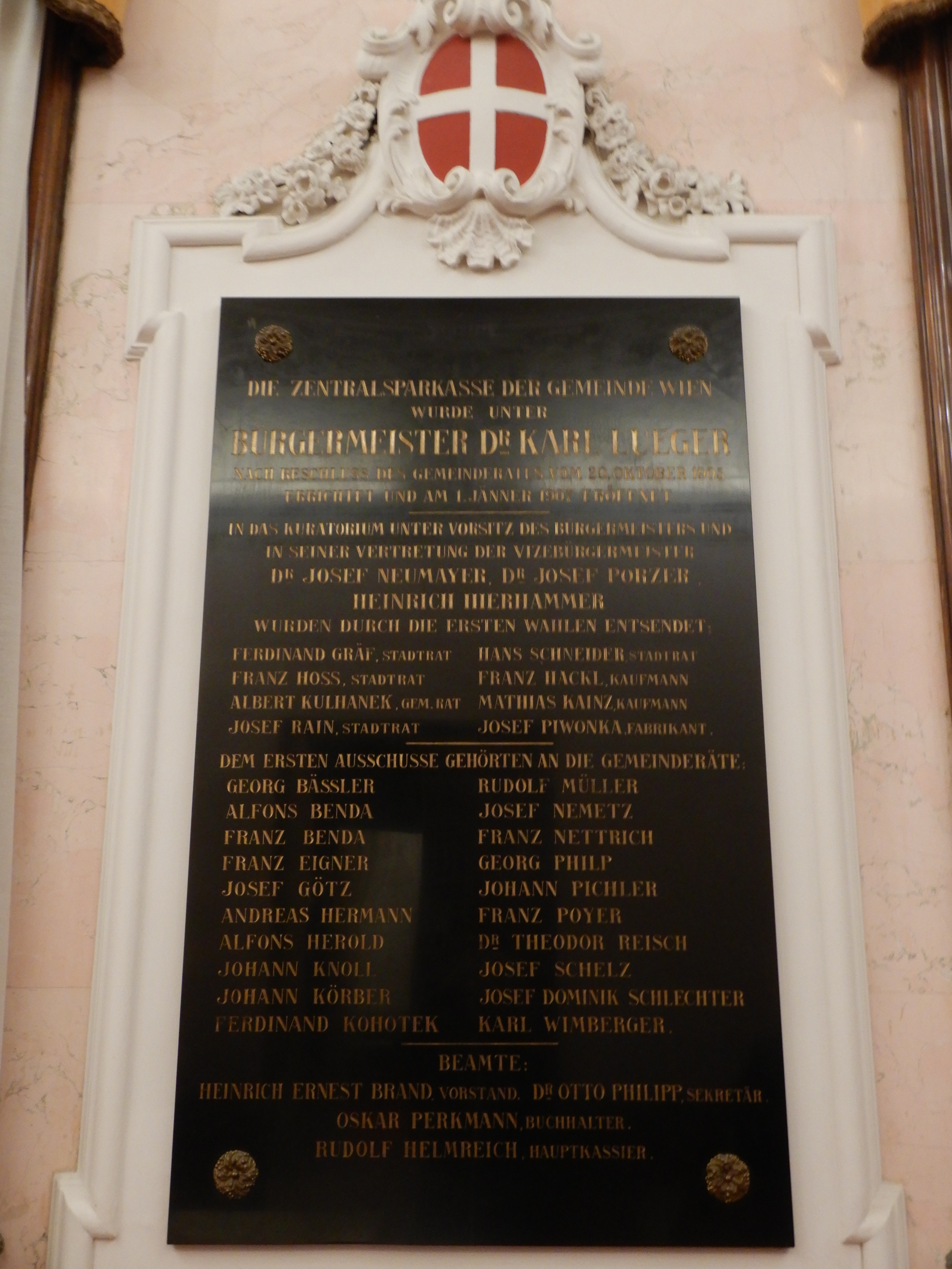 Gedenktafel für die Gründung der Zentralsparkasse der Gemeinde Wien (Wien, Wipplingerstraße 8, Magistratisches Bezirksamt)